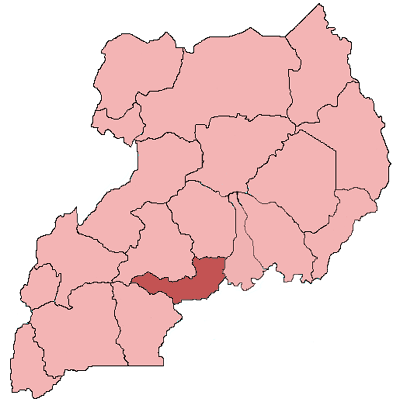 Mappa dell'arcidiocesi cattolica di Kampala, in Uganda. Lavoro personale, eseguito a partire da questa immagine di Commons. Fonte per i confini delle diocesi: Guida delle missioni cattoliche 2005, a cura della Congregatio pro gentium evangelizatione, Roma, Urbaniana University Press, 2005. Categoria:Chiesa cattolica in Uganda